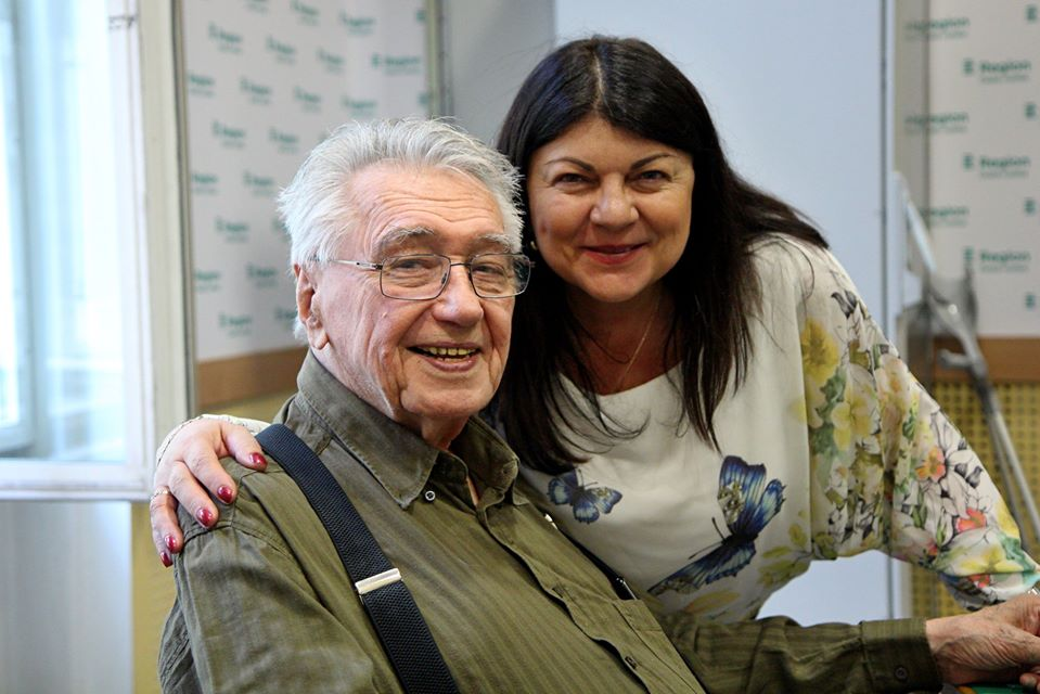 Jana Chládková a Josef Zíma v ČRo - Region